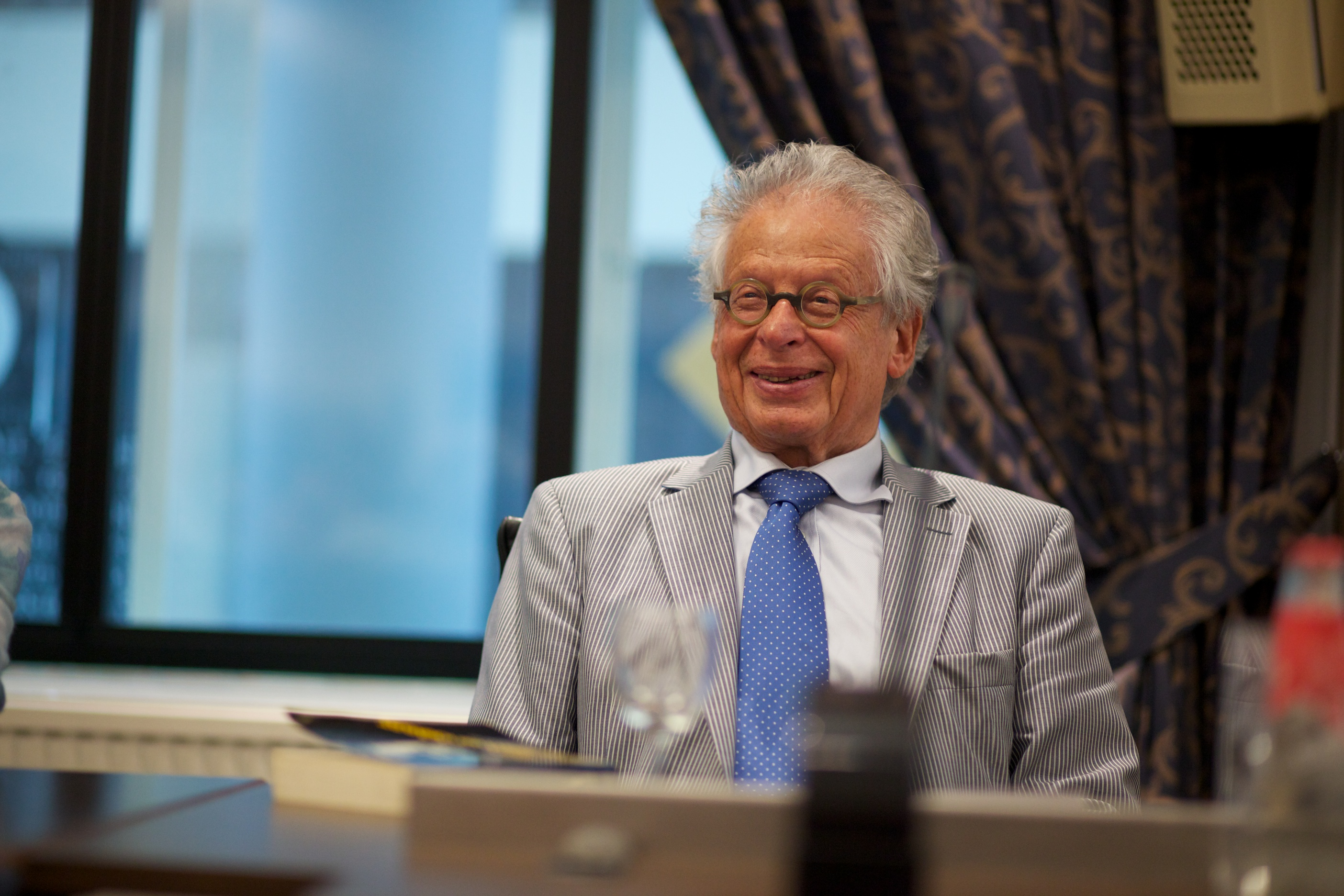 Ed van Thijn bij Nationaal Archief & Spaarnestad Photo join Wikipedia